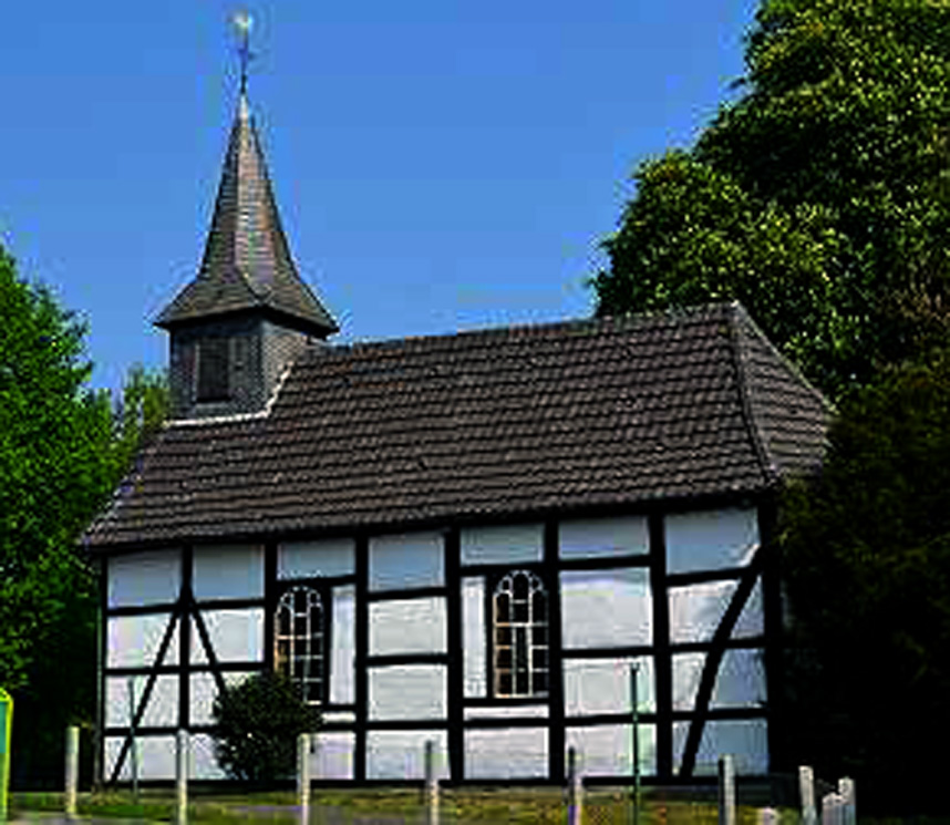 St. Antoniuskapelle in Stocklarn This is a photograph of an architectural monument.